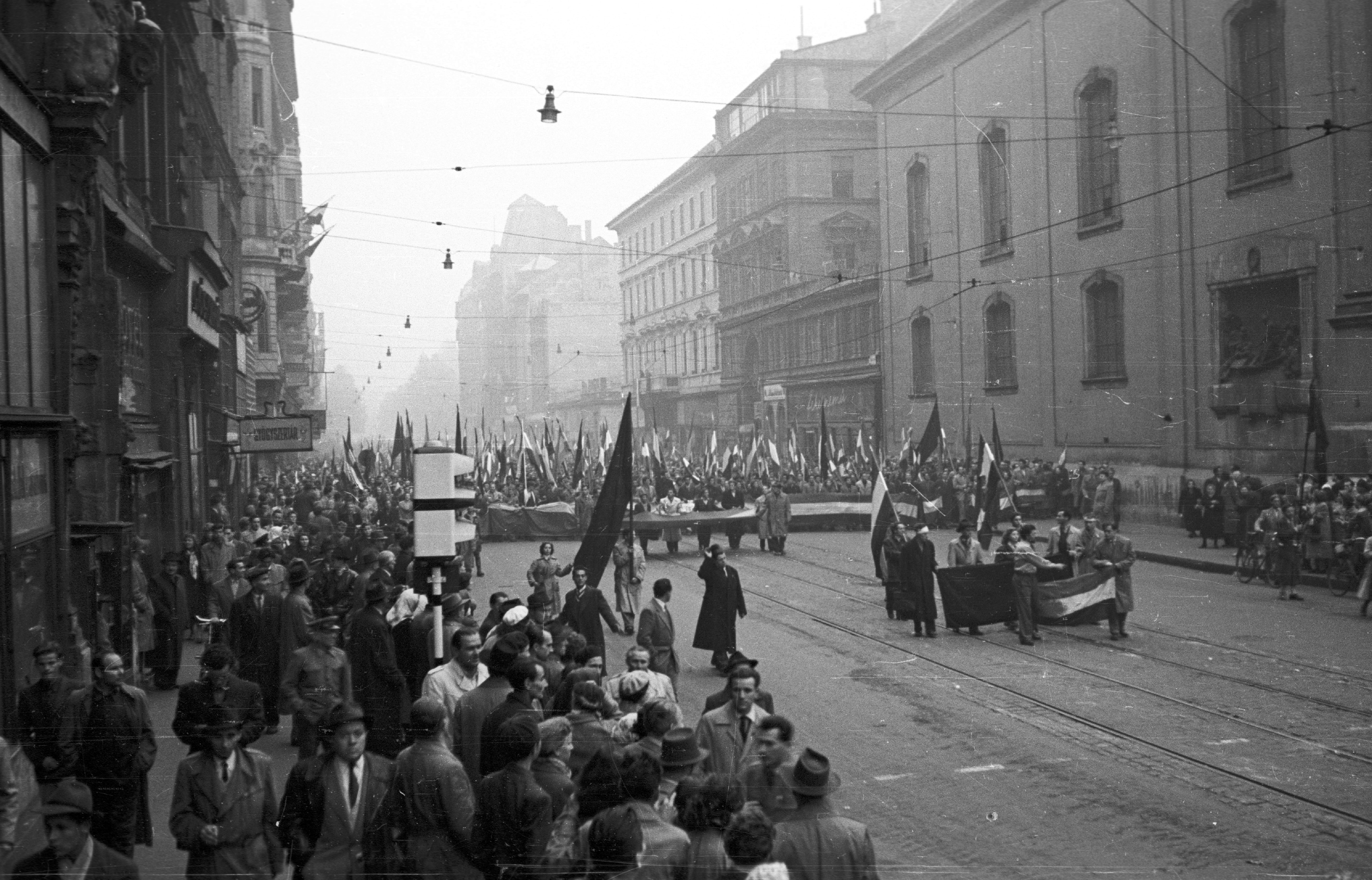 Kossuth Lajos utca a Ferenciek tere felől nézve. 1956. október 25-e délután, "véres-zászlós" tüntetés. Location: Hungary, Budapest V. Tags: march, flag, Budapest, revolution Title: Kossuth Lajos utca a Ferenciek tere felől nézve. 1956. október 25-e délután, \